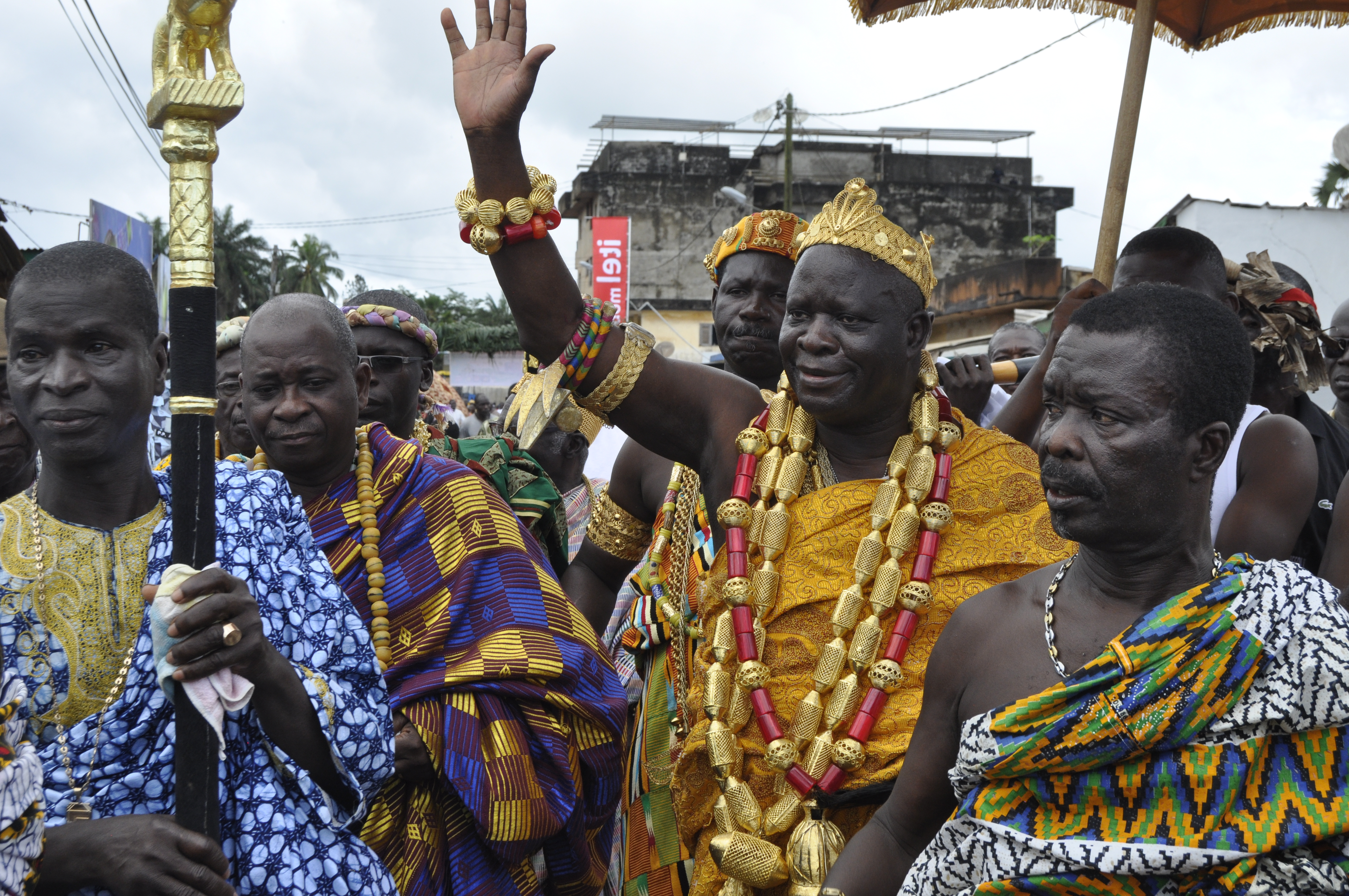 Le roi du Sanwi à l'occasion d'une sortie publique